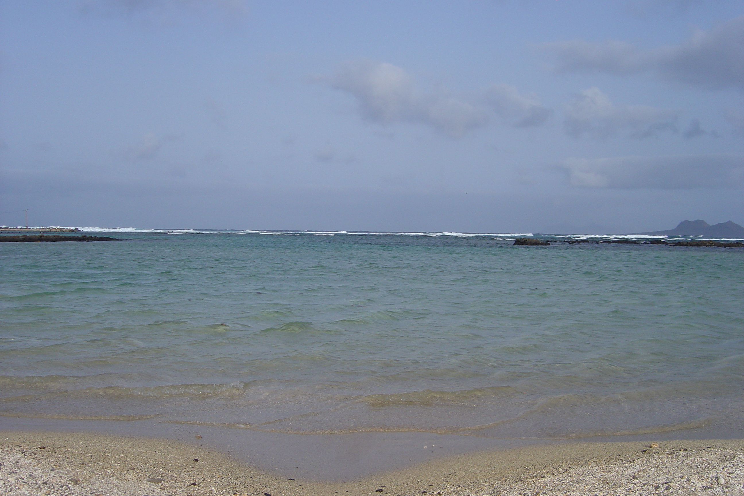 Baía das Gatas, São Vicente Island, Cape Verde